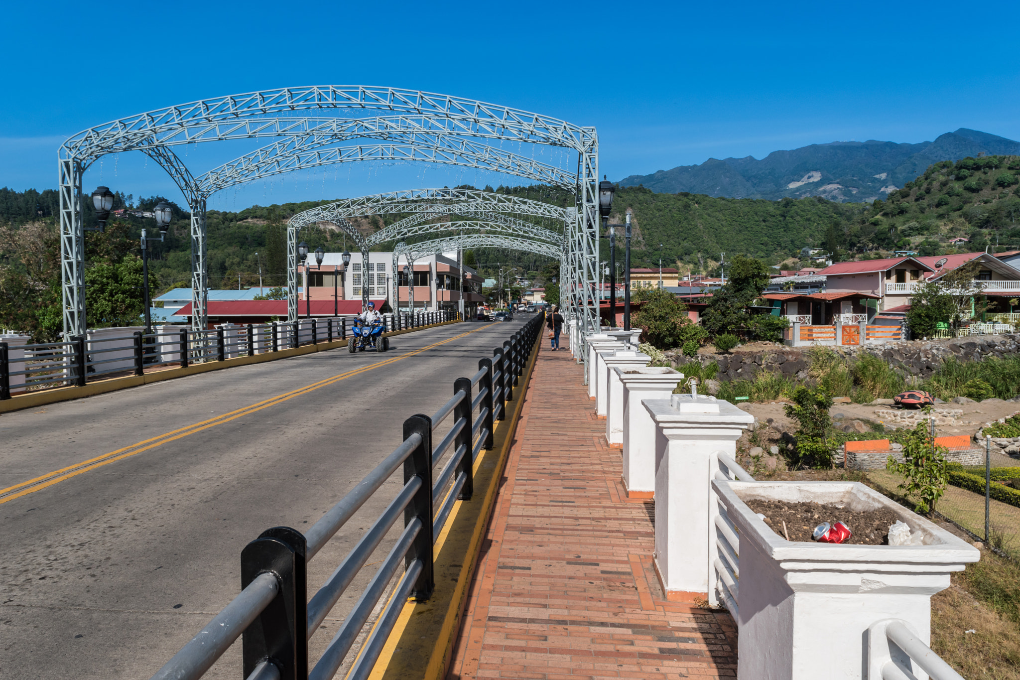 500px provided description: Brücke In Boquete Panama [#panama ,#photo ,#sight ,#travelling ,#vulkan ,#gebirge ,#urlaub ,#reisen ,#wandern ,#sehensw?rdigkeit ,#wanderlust ,#boquete ,#baru ,#chiriqu? ,#bar? ,#allgemein]